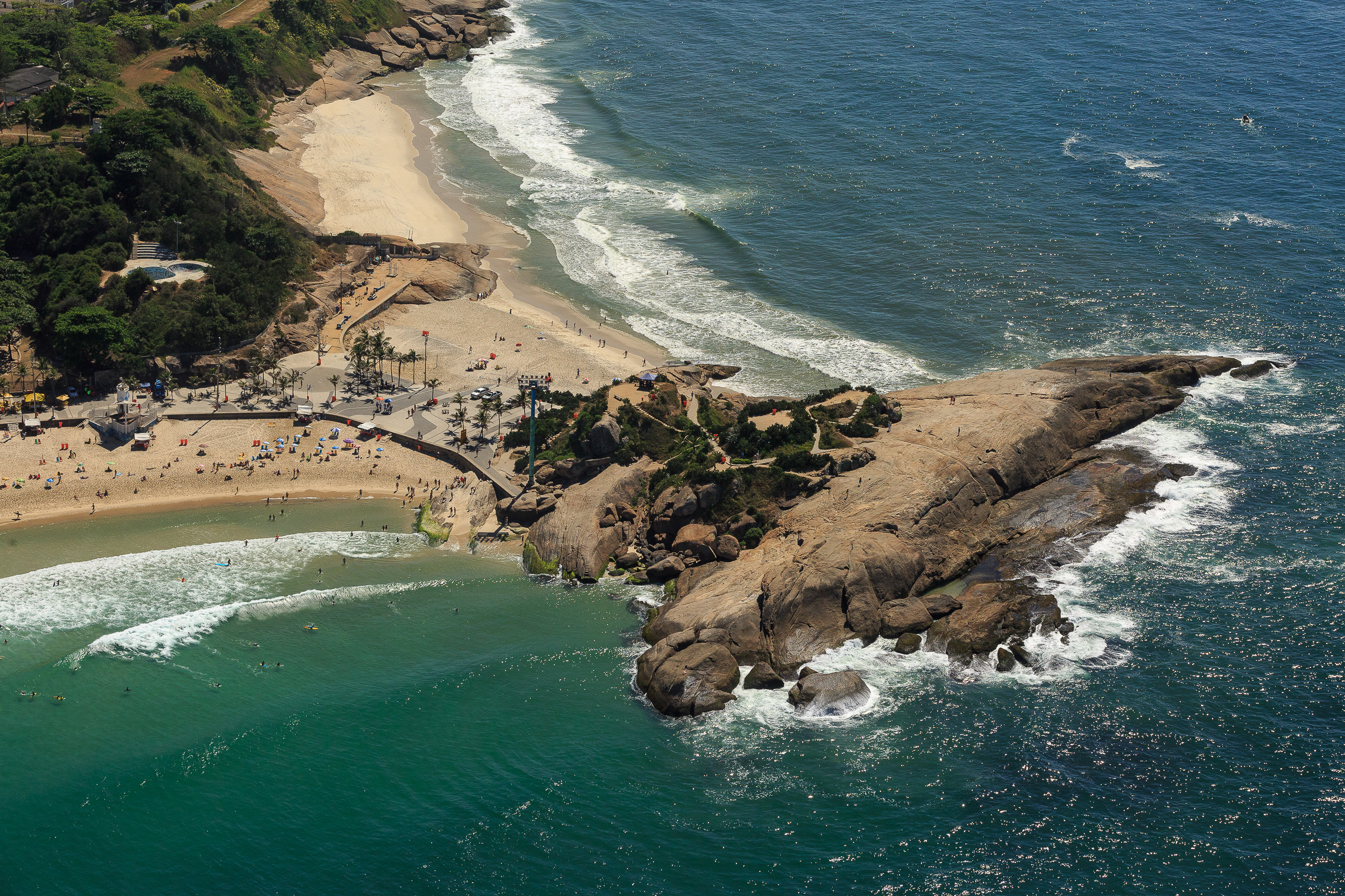 Vista aérea do Arpoador, localizado na cidade do Rio de Janeiro